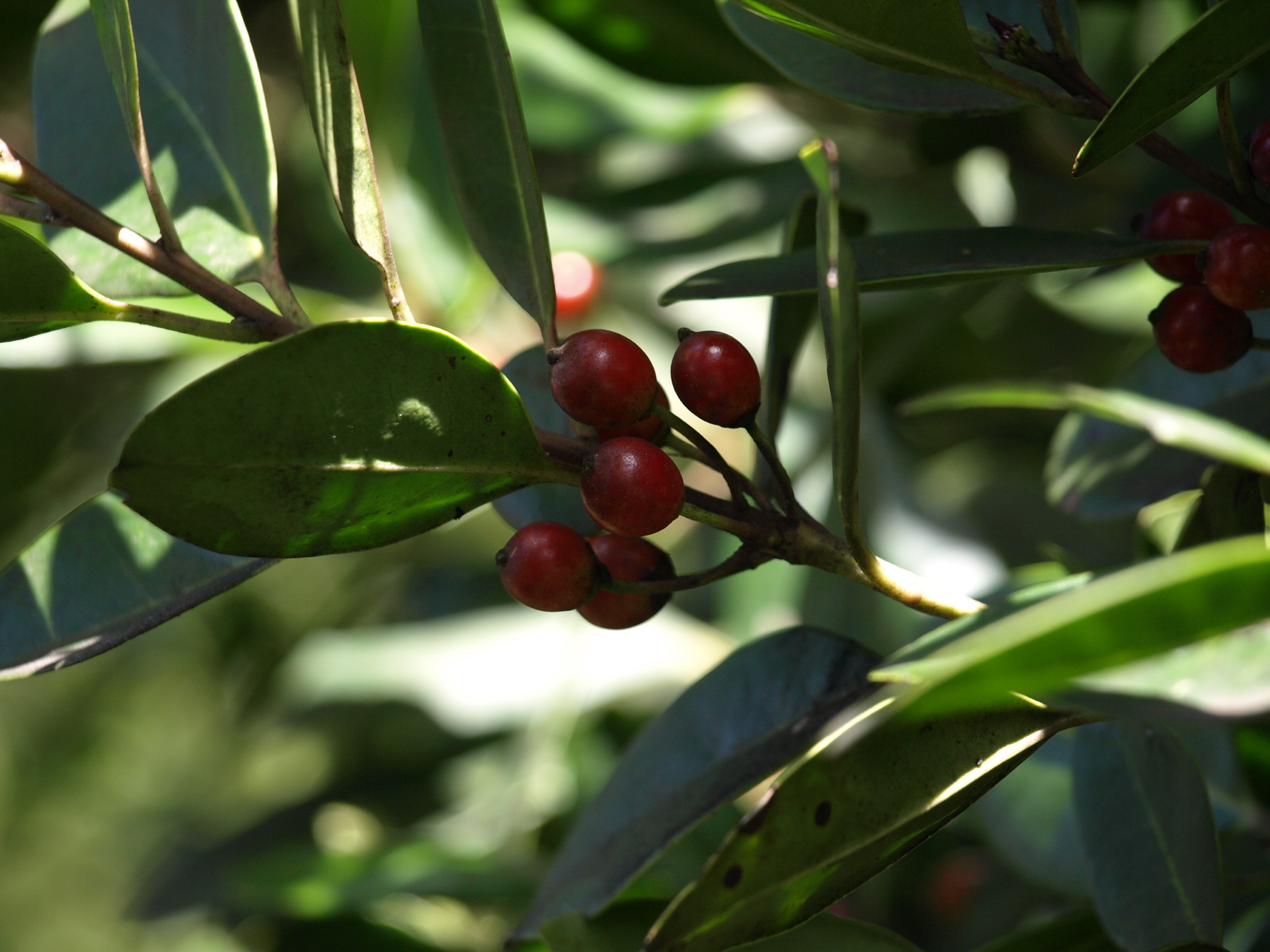 Ramilla de Ilex canariensis (acebiño) con fruto